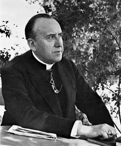 L’archimandrite Irénée (Winnaert) avait quitté l’Eglise Catholique à la recherche d’une foi plus vivante. Après un long périple il fut reçu dans l'Orthodoxie, grâce à la Confrérie saint Photius, par monseigneur Serge (Stragorodsky) en 1936. Il mourrut peu après, ayant atteint le but de sa recherche, le 3 mars 1937.